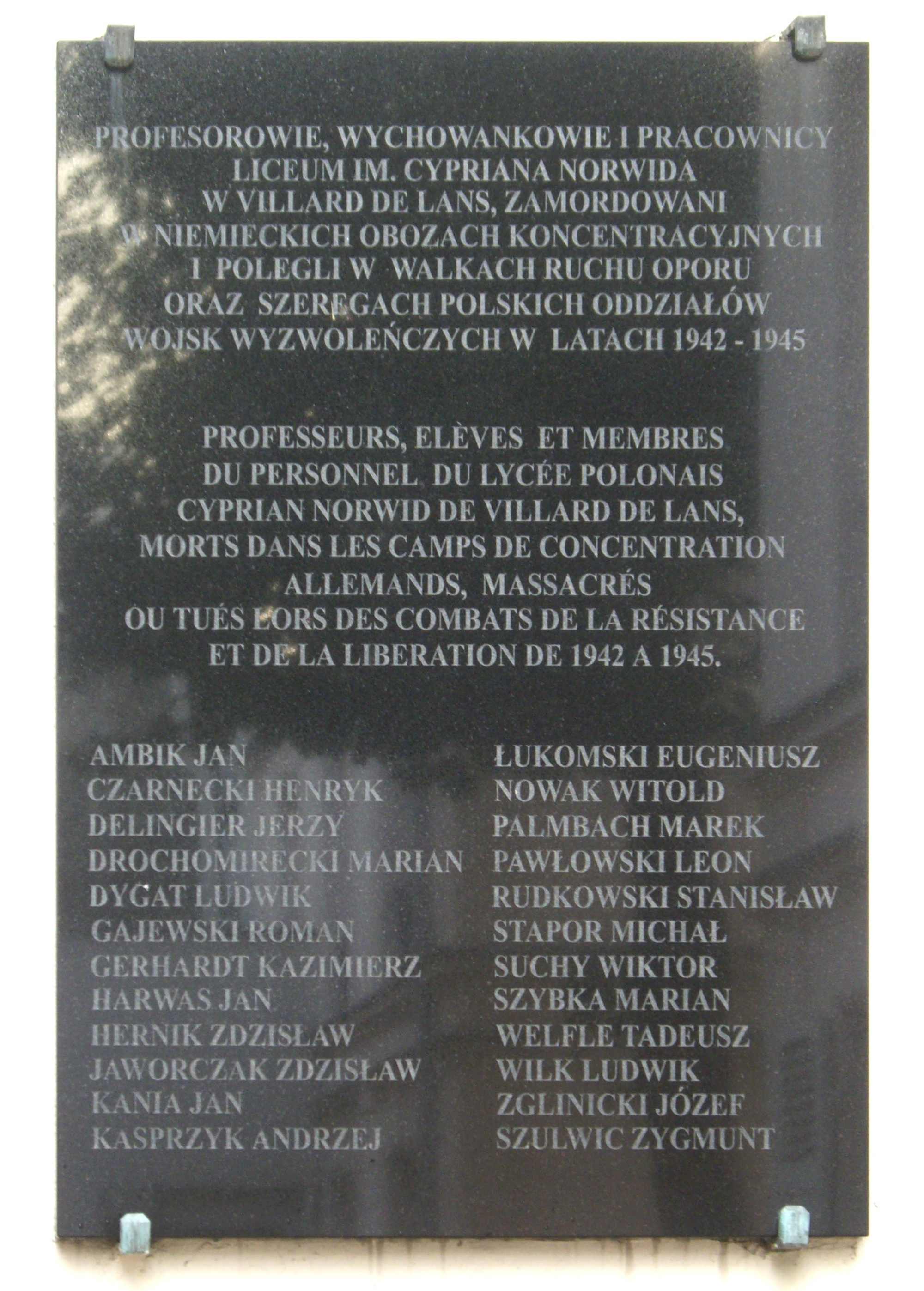 Plaque commémorative, École polonaise de Paris, 13-15 rue Lamandé, Paris 17e.« Professeurs, élèves et membres du personnel du lycée polonais Cyprian Norwid de Villard-de-Lans, morts dans les camps de concentration allemands, massacrés ou tués lors des combats de la Résistance et de la Libération de 1942 à 1945. »